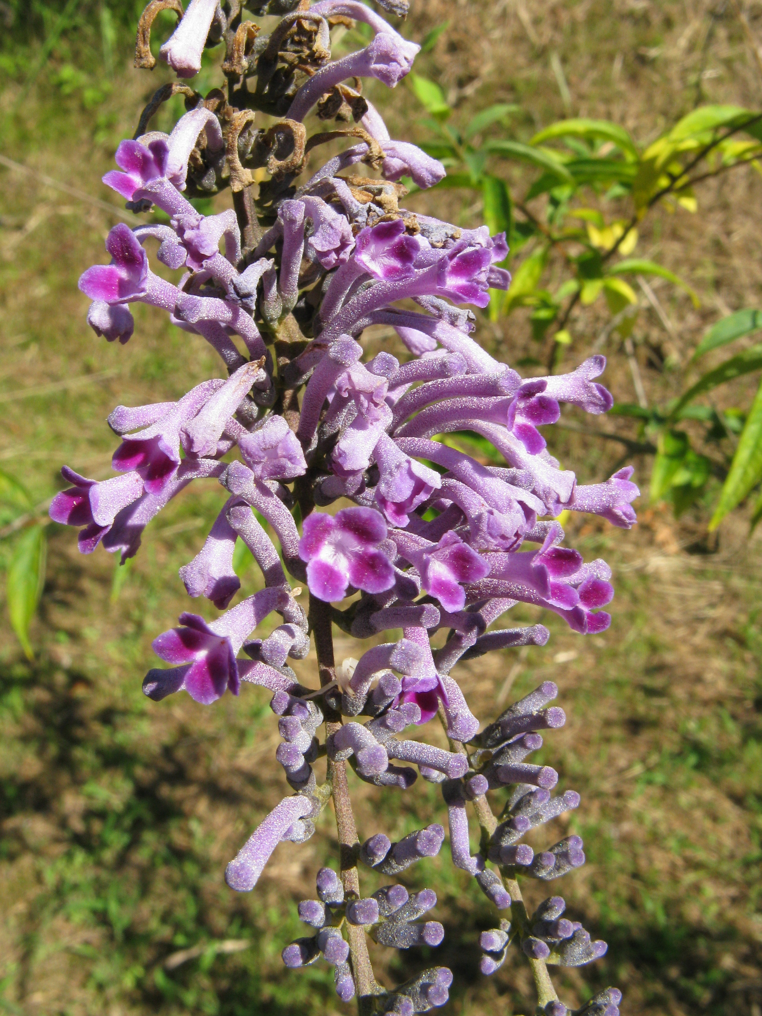 Scientific name Buddleja japonica